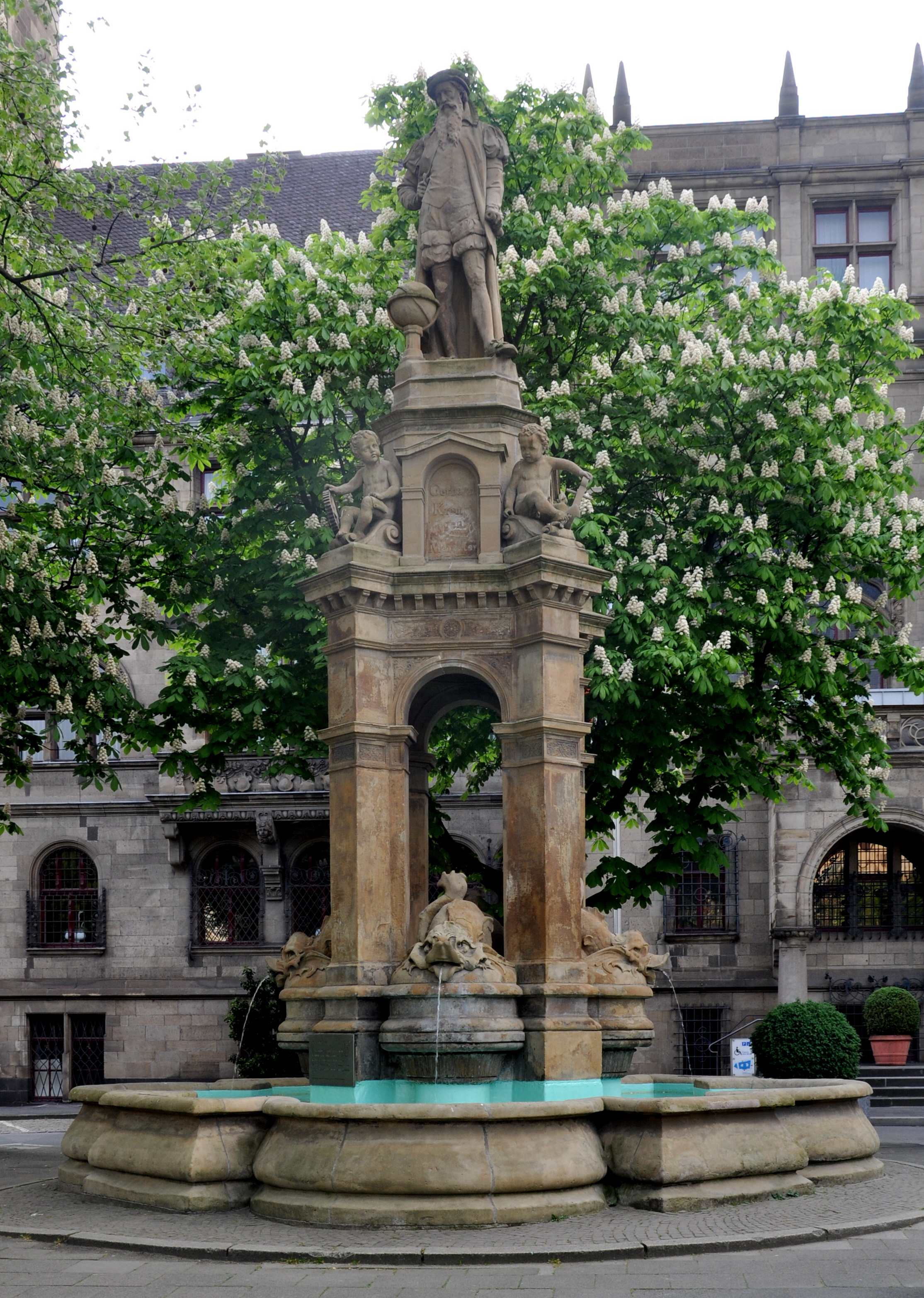 Duisburg, Mercatorbrunnen (von Joseph Reiss, 1878) vor dem Rathaus am Burgplatz